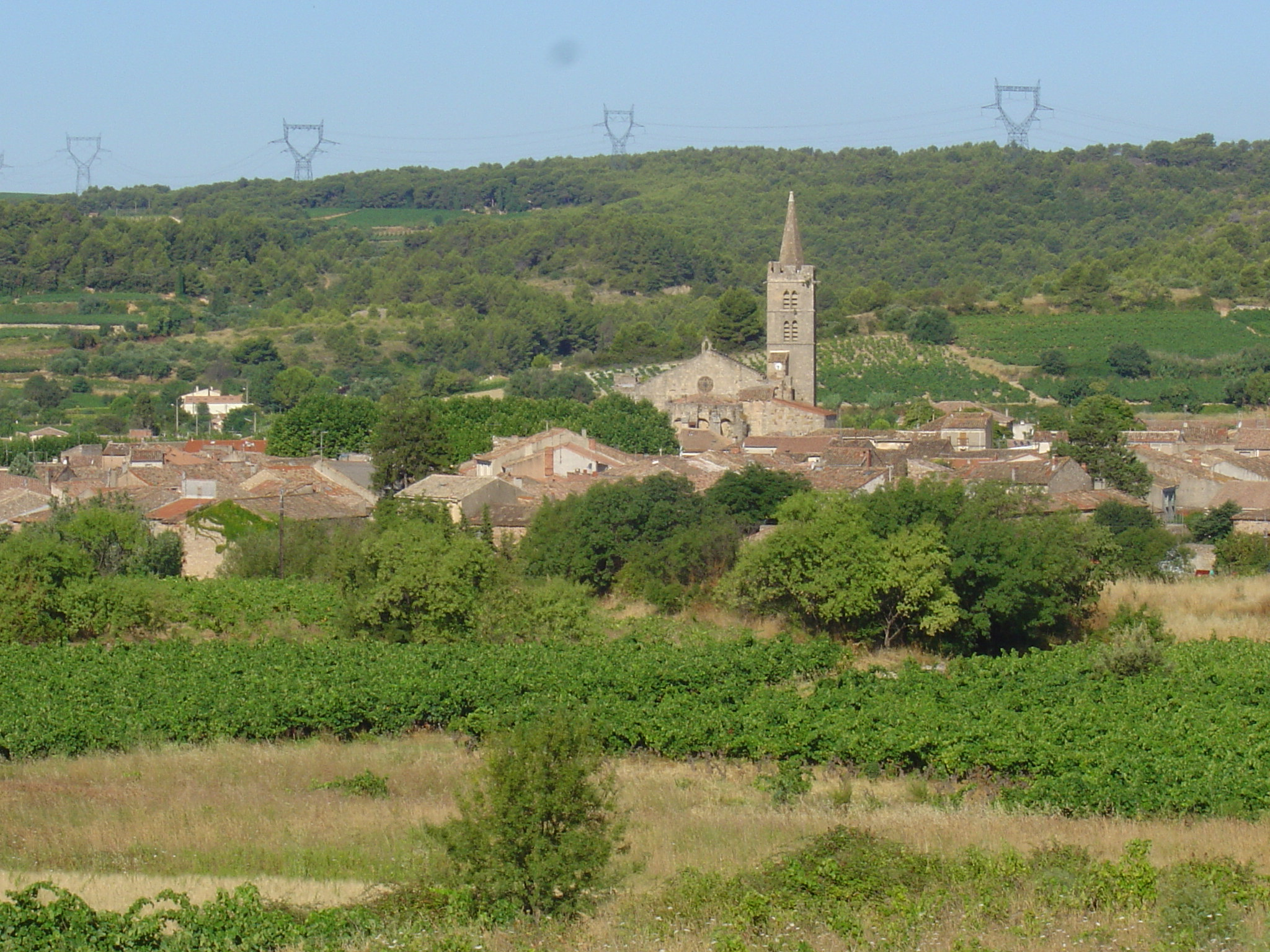 creisson jm : Cruzy en aout